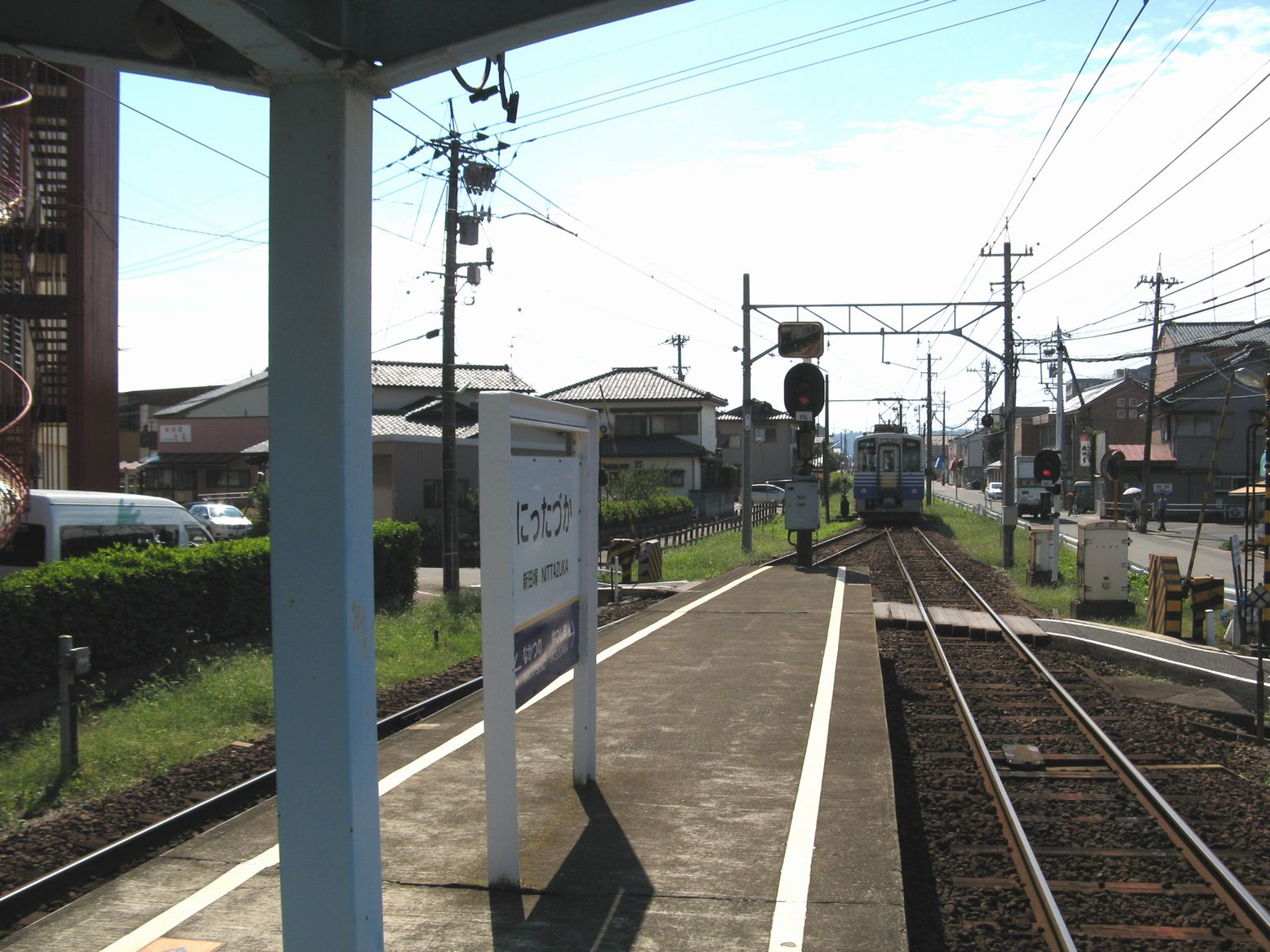 新田塚駅ホーム 南望